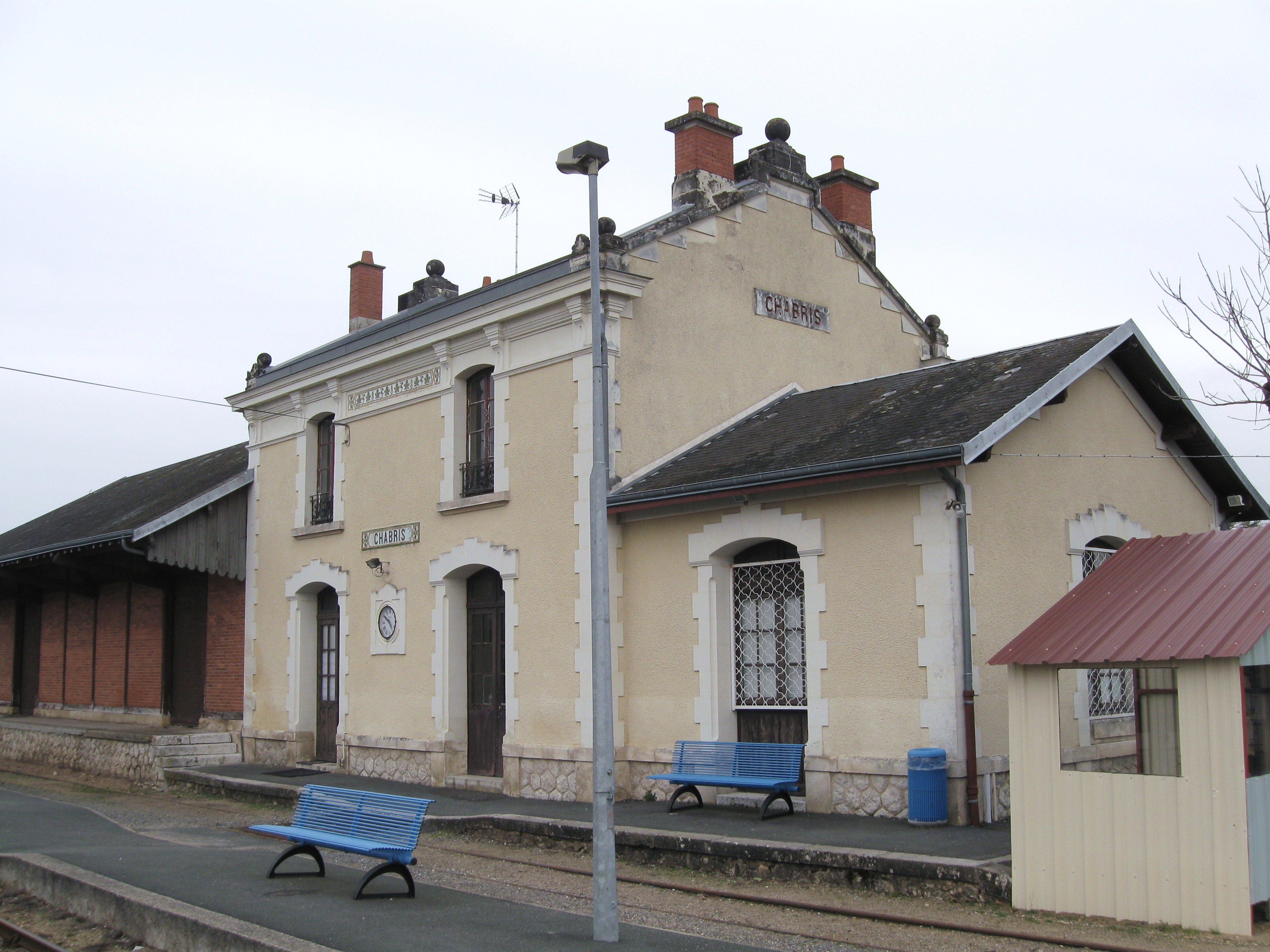 Gare de Chabris, Indre, France